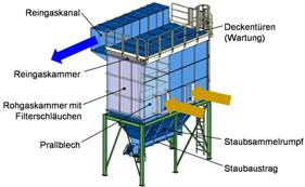 Konstruktive Merkmale eines Schlauchfilters